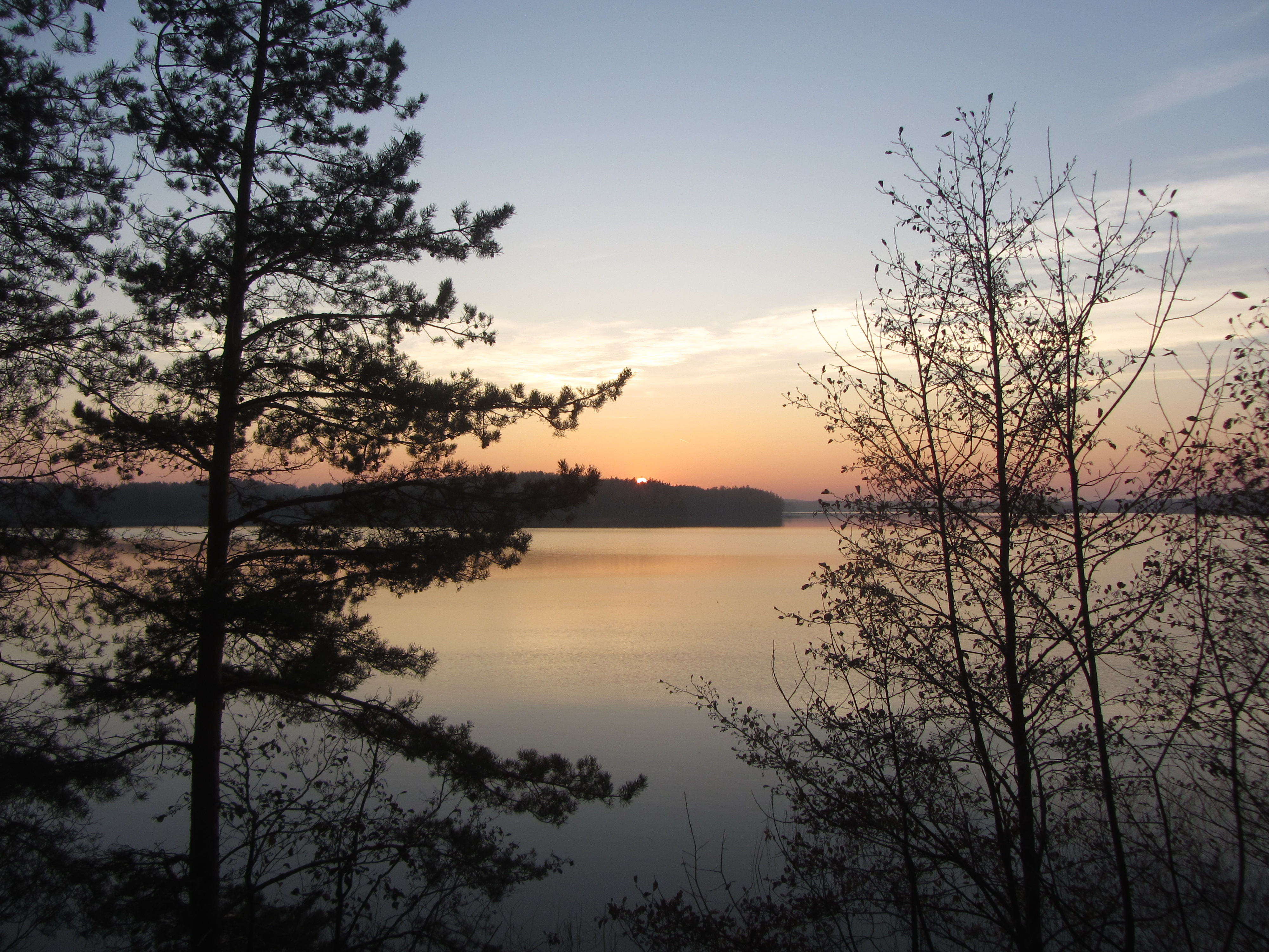 Salako sen., Lithuania